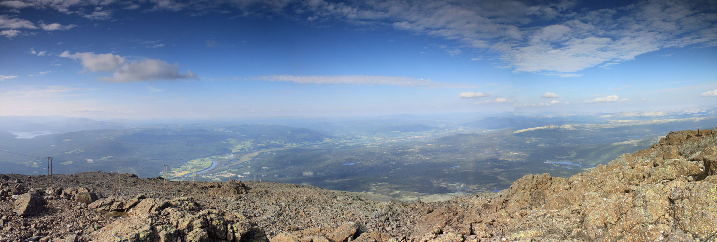 Panoramablick von der Spitze des Tronfjell